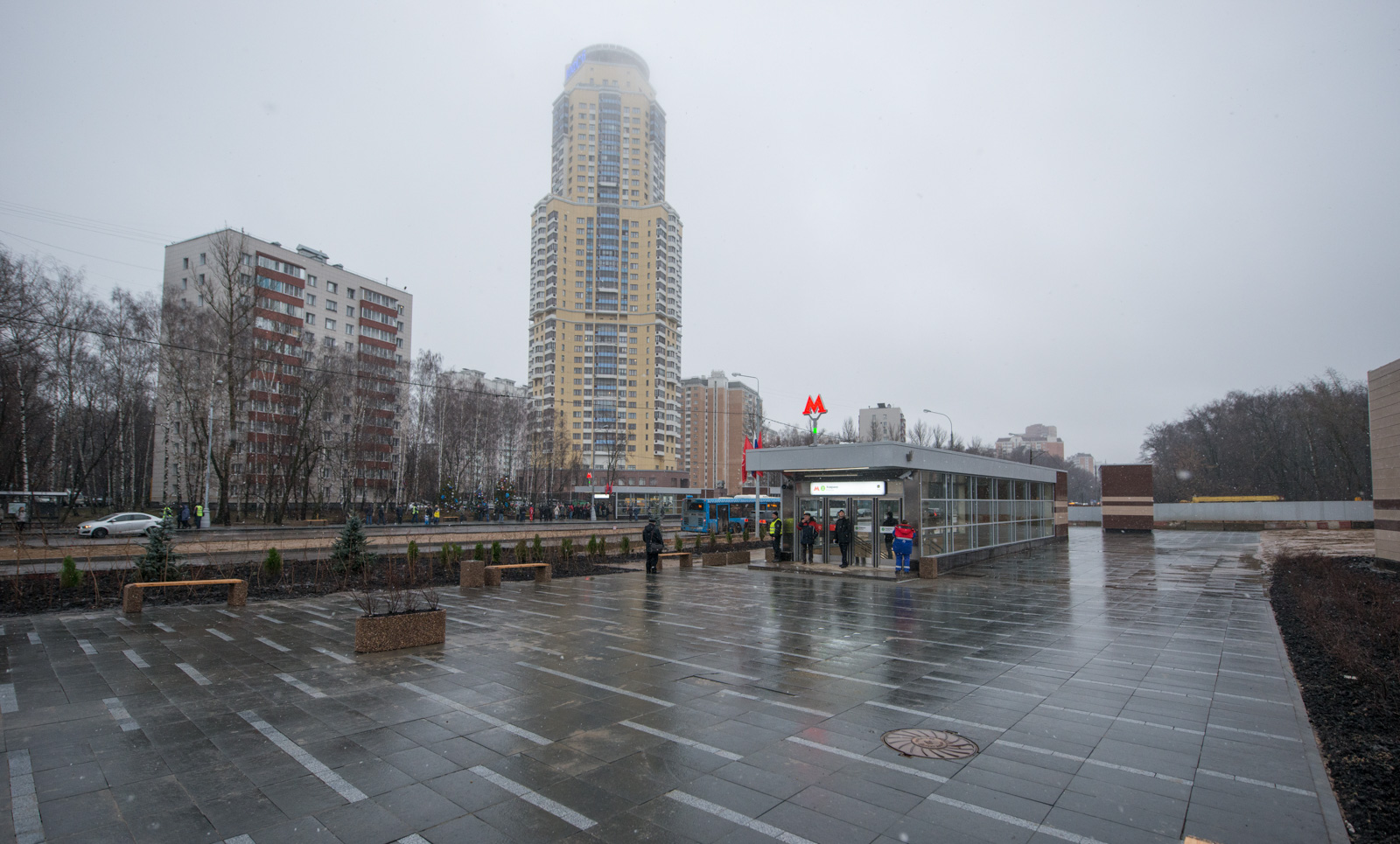 Станция Ховрино Московского метрополитена. Площадь перед входным вестибюлем на улице